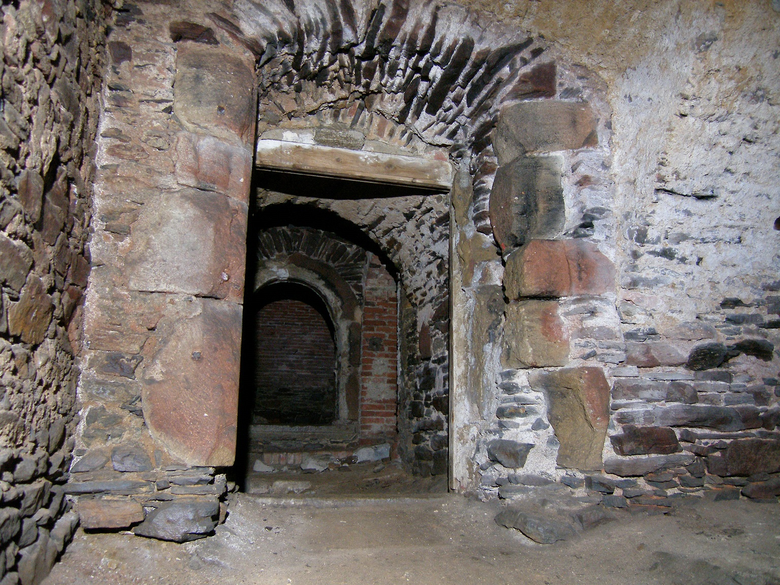 Toužim, areál zámku. Interiér podzemní prostory v nejstarším jádru objektu Horního zámku, pozůstatek proboštství a hradu.